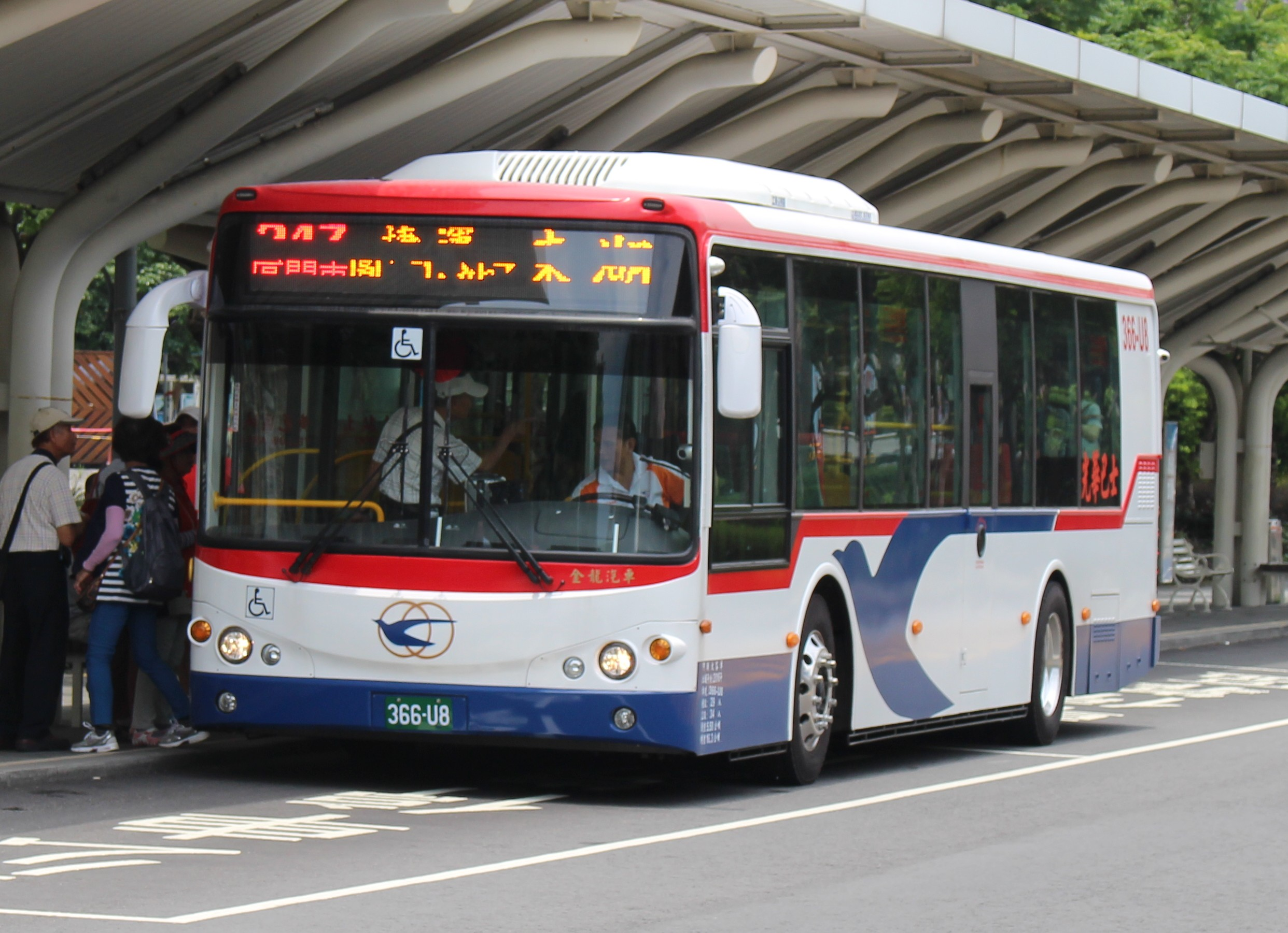 光華巴士 2016 KINGLONG KL6112U1 366-U8 247區間車